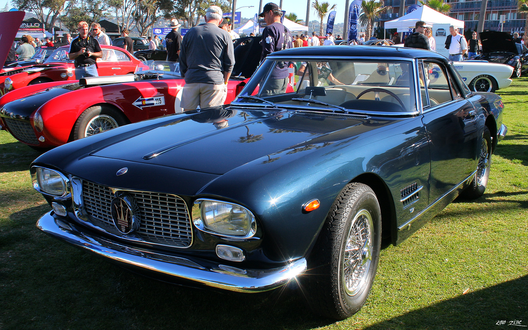 La Jolla Motor Car Classic, Jan 10, 2010